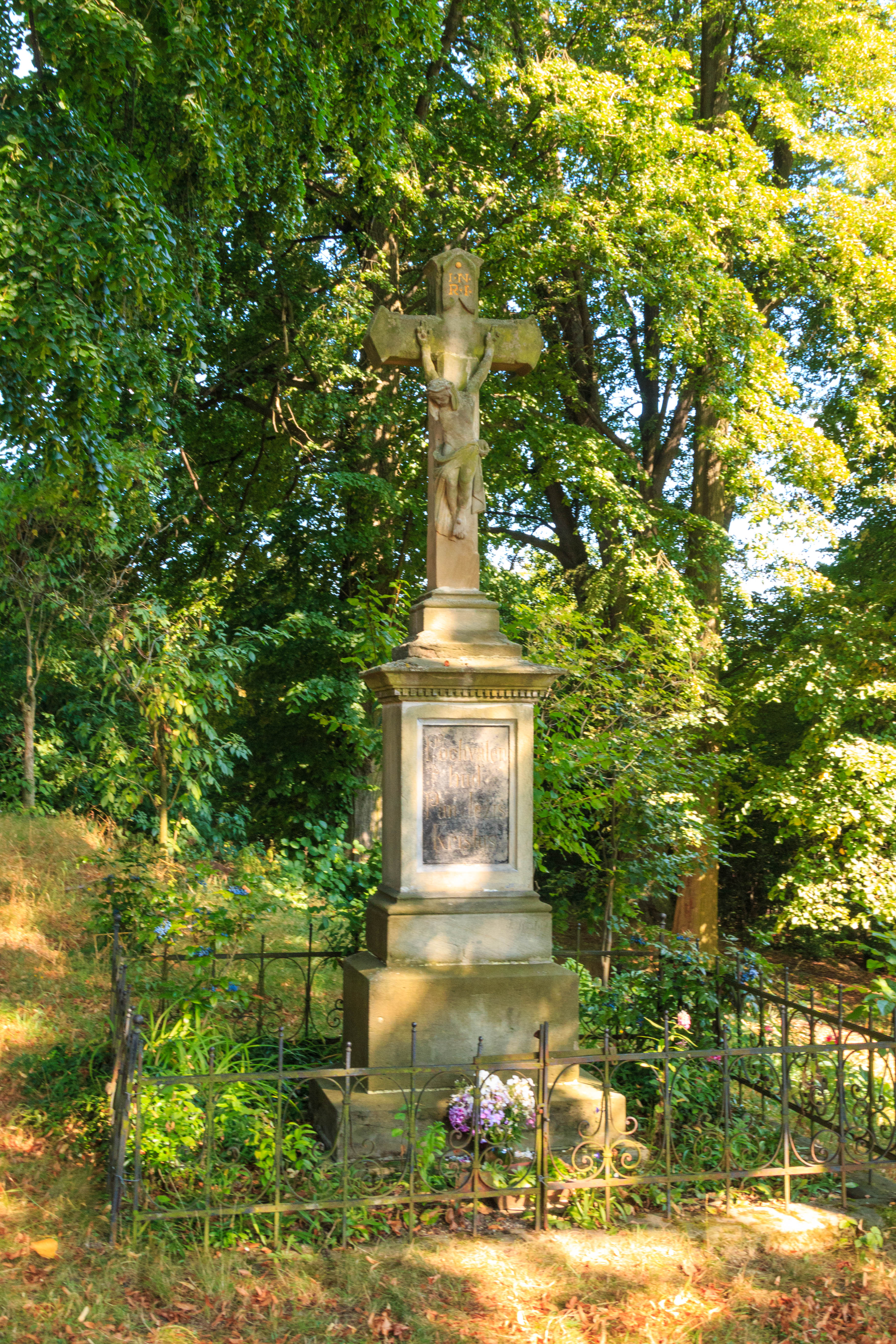 Rabouň - křížek